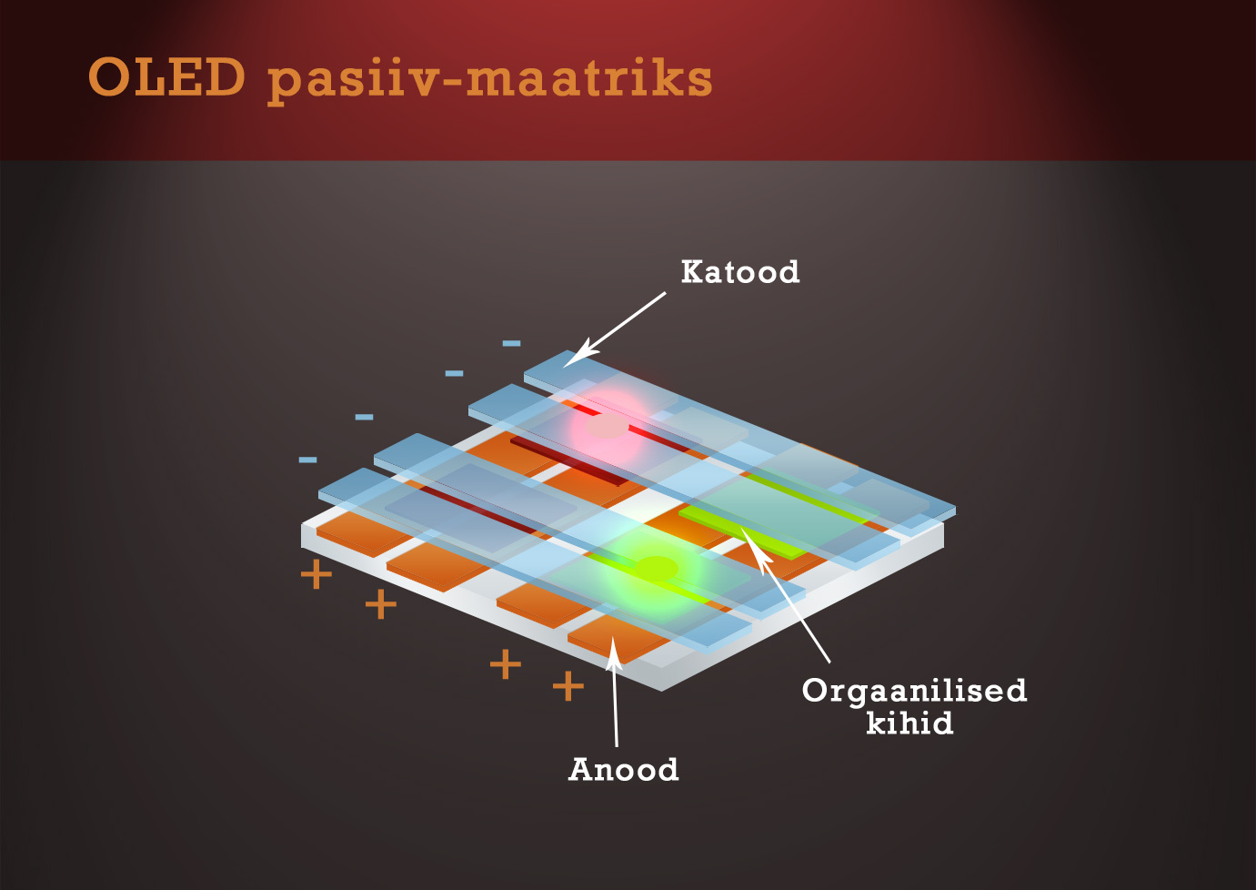 Passiiv-maatriksiga OLED-i ehitus